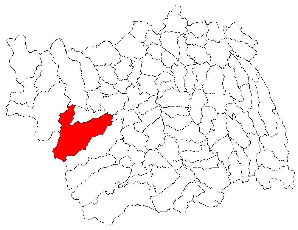 Categorie:Hărţi ale judeţului Bacău